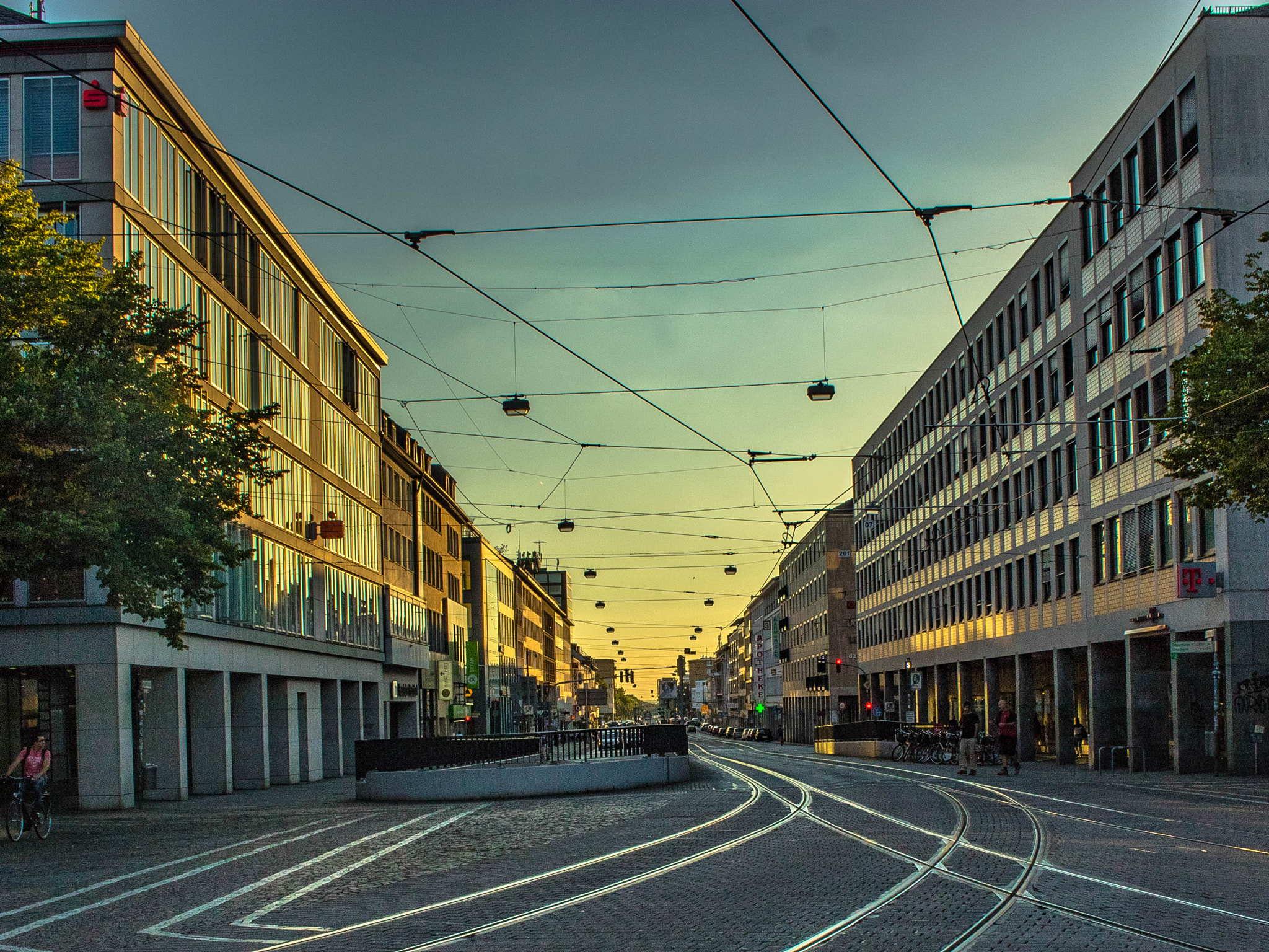 500px provided description: Luisenplatz [#city ,#sunset ,#street ,#reflection ,#europe ,#urban ,#architecture ,#cityscape ,#germany ,#street photography ,#darmstadt]